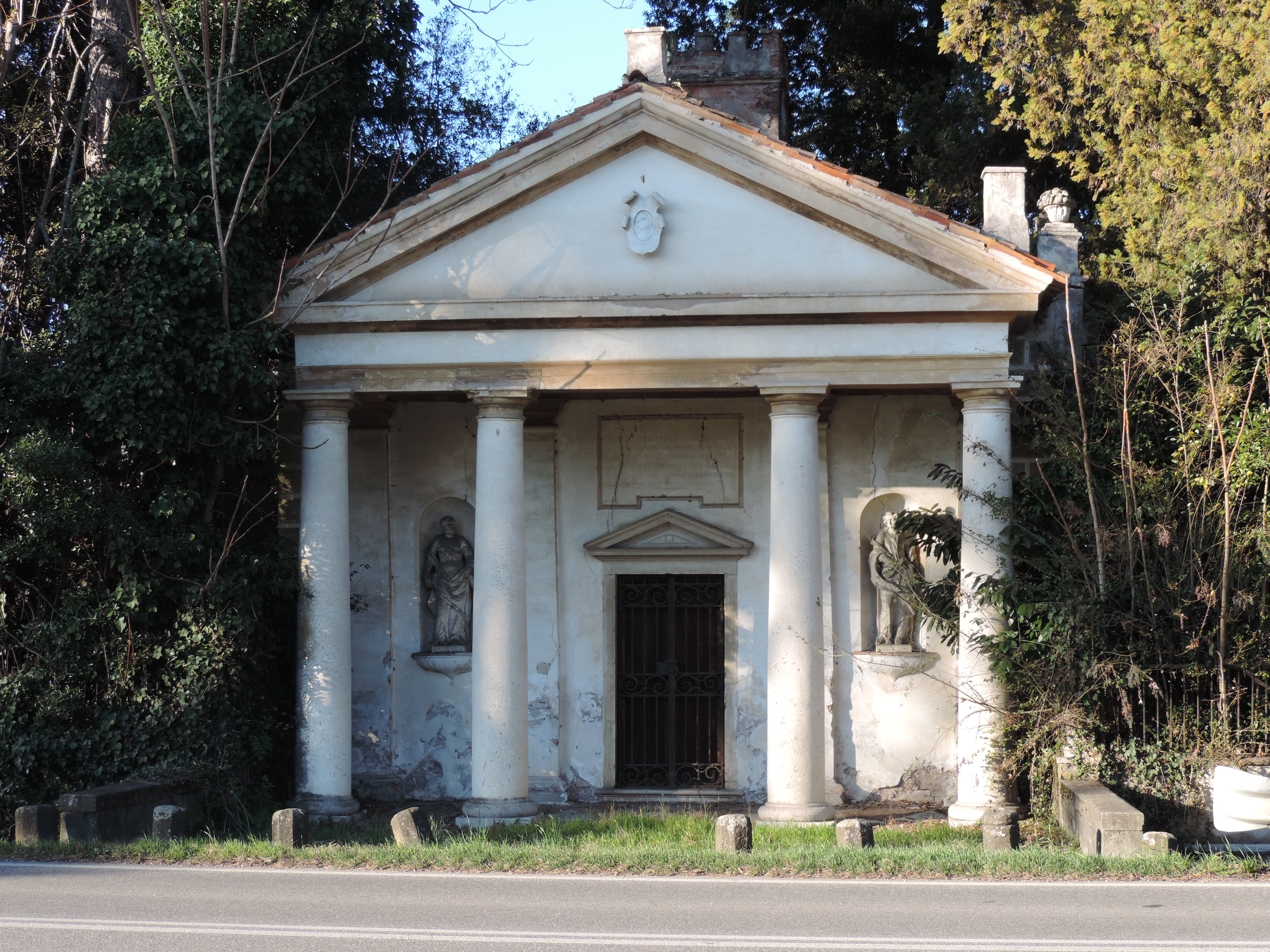 Oratorio di villa Marcello a Preganziol.